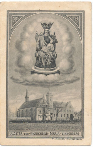 Das Gnadenbild in Vinnneberg